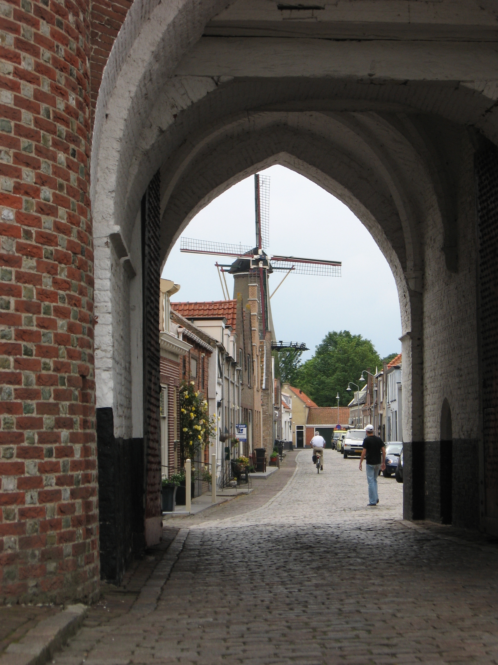 Nobelpoort doorkijkje, Zierikzee